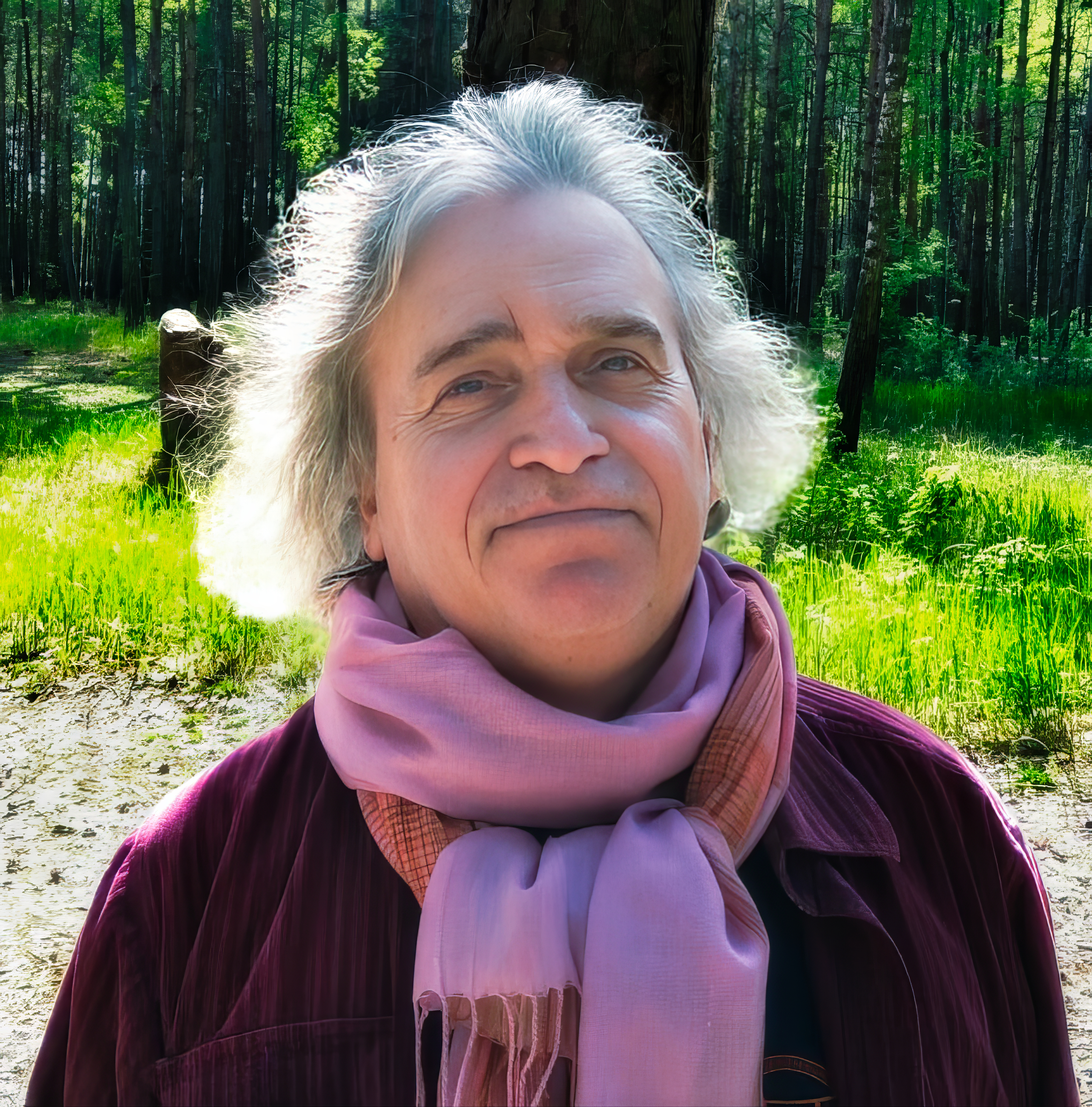 Композитор Михаил Шух (1952 - 2018)